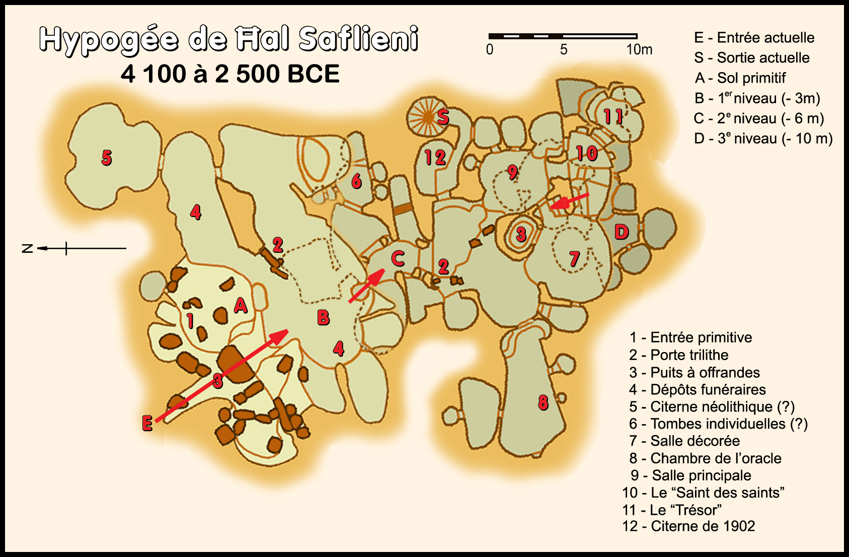 Plan de l'hypogée de Hal Saflieni